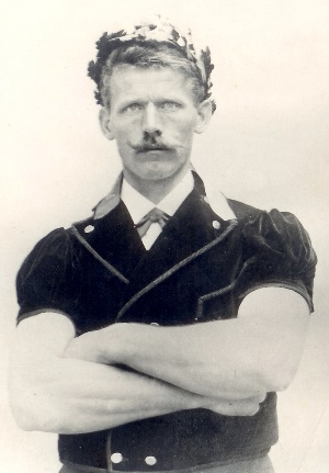 Betschart Franz aus Ingenbohl war wohnhaft in Unterschönenbuch (Oberigs). Er war einer der besten Schwinger seiner Zeit und sein Bruder Xaver hat 1908 am Eidgenössischen das Steinstossen mit Rekord gewonnen. Allgemein wurde den "Güchlern" eine unwahrscheinliche Kraft zugesagt./ Quelle: Im Haus meines Vaters beim renovieren gefunden